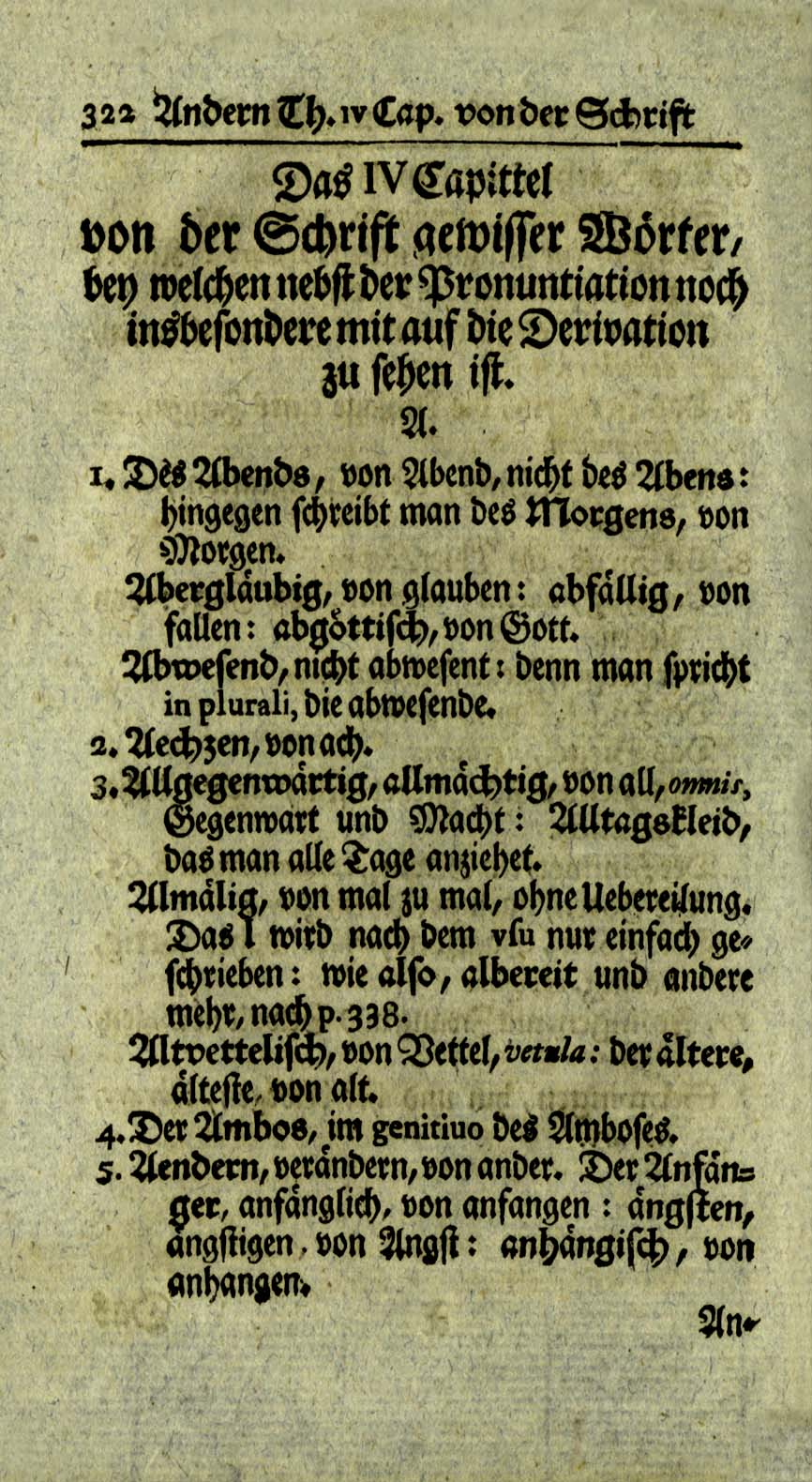 Hieronymus Freyer: Anweisung zur Teutschen Orthographie. Seite 322